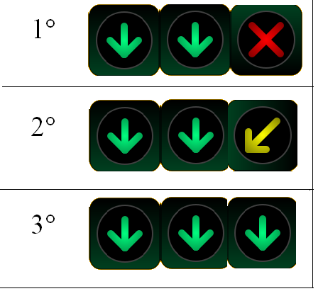 Example of lane control signals, in French. Esempio di corsie dinamiche in italia